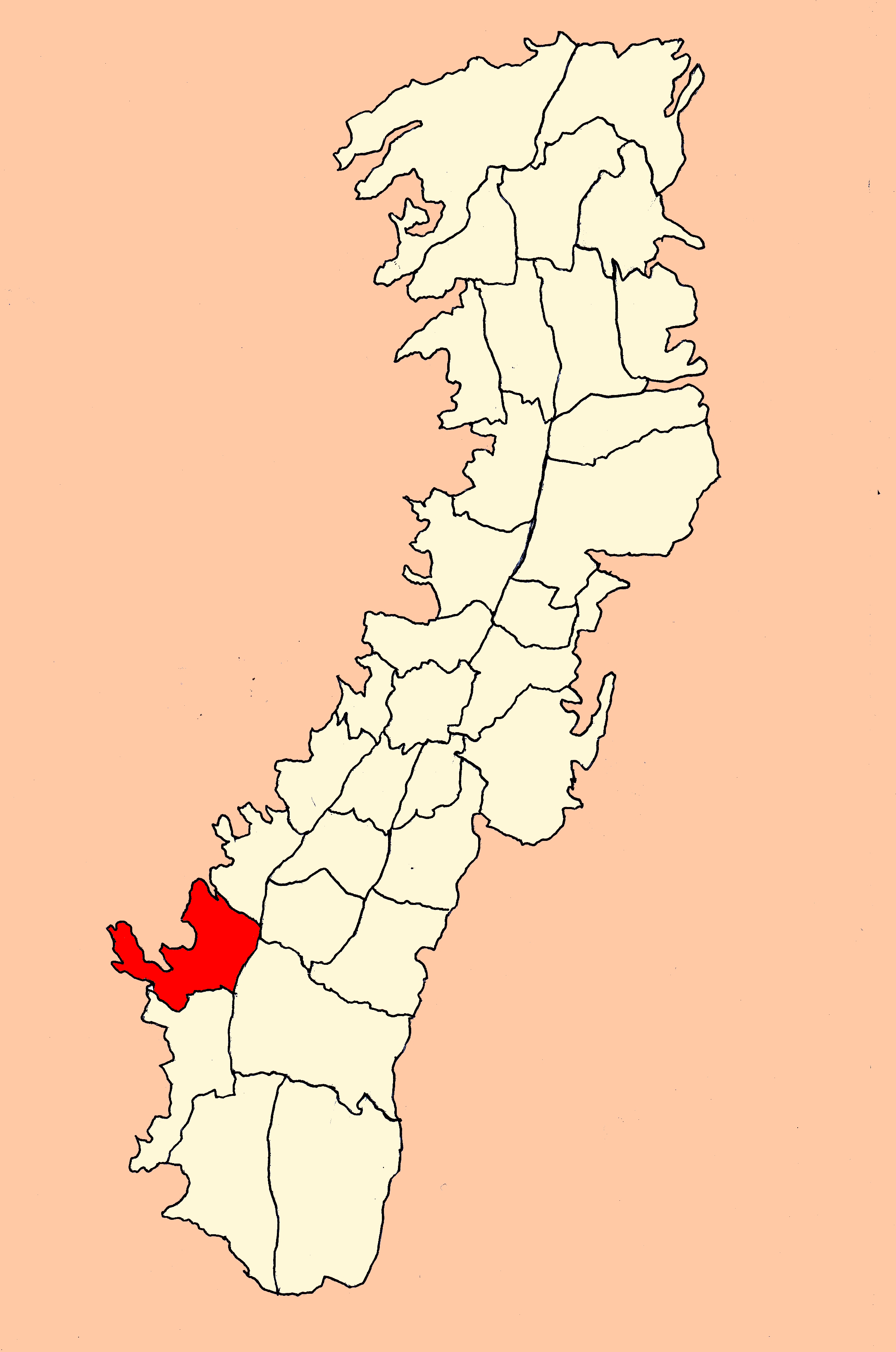 Parroquia Chillogallo (Quito, Ecuador)